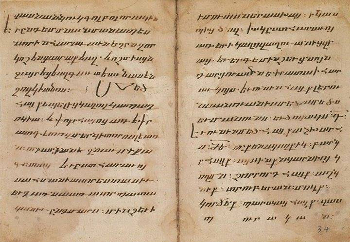 Страница из рукописи "Ашхарацуйца", 1178 год